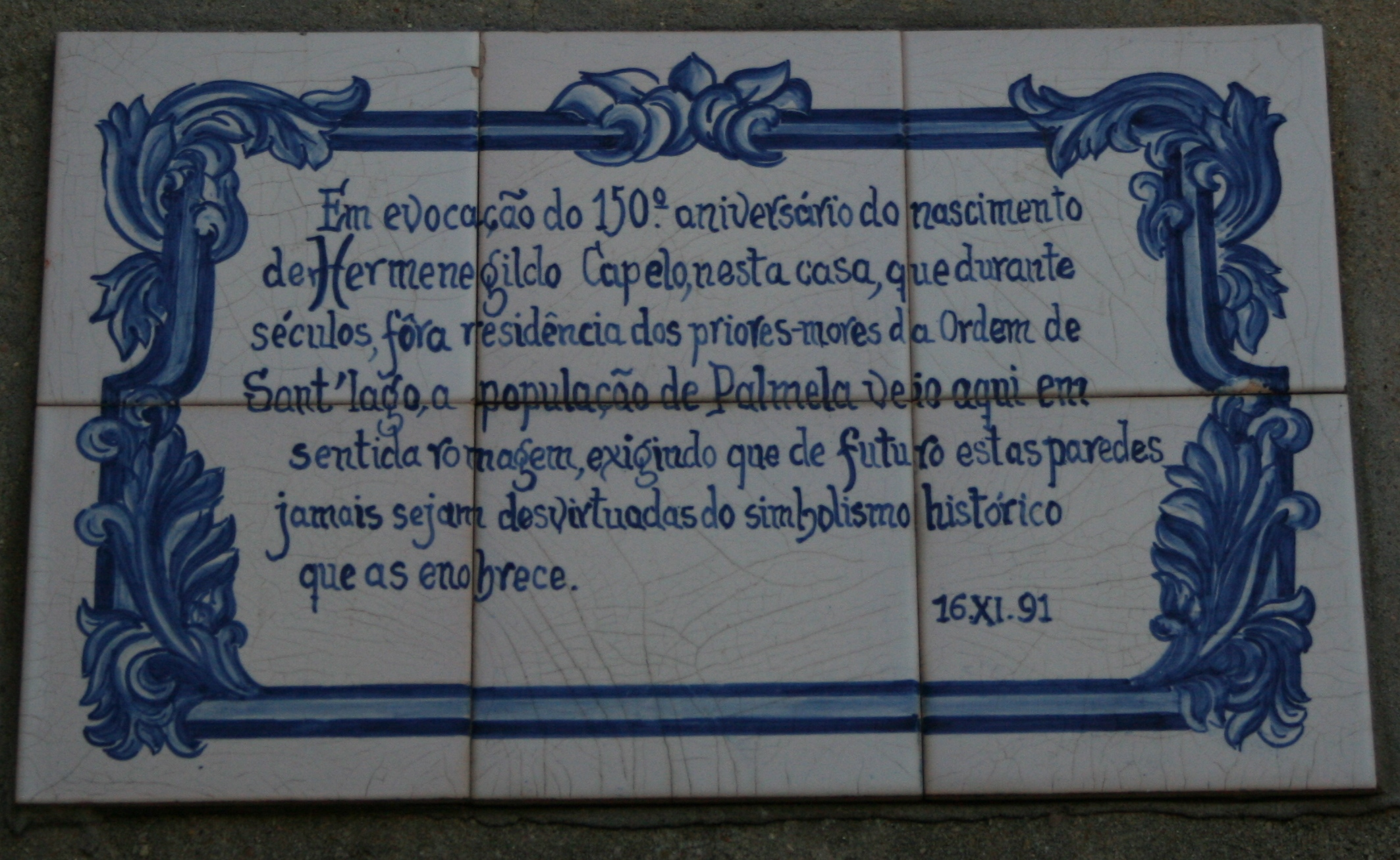 Placa comemorativa do 150.º aniversário de Hermenegildo Capelo, colocada na casa em que nasceu, no castelo de Palmela (Portugal)